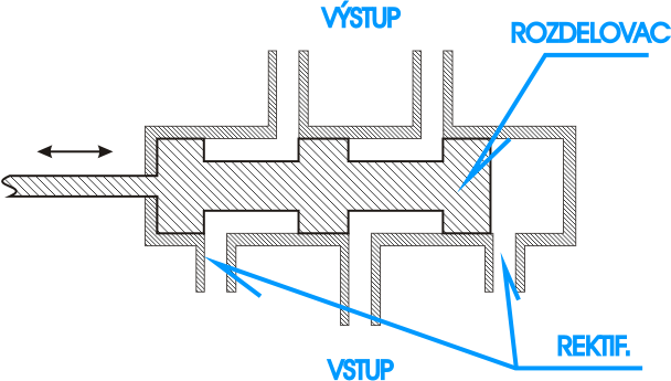 Kategória:Obrázky schém